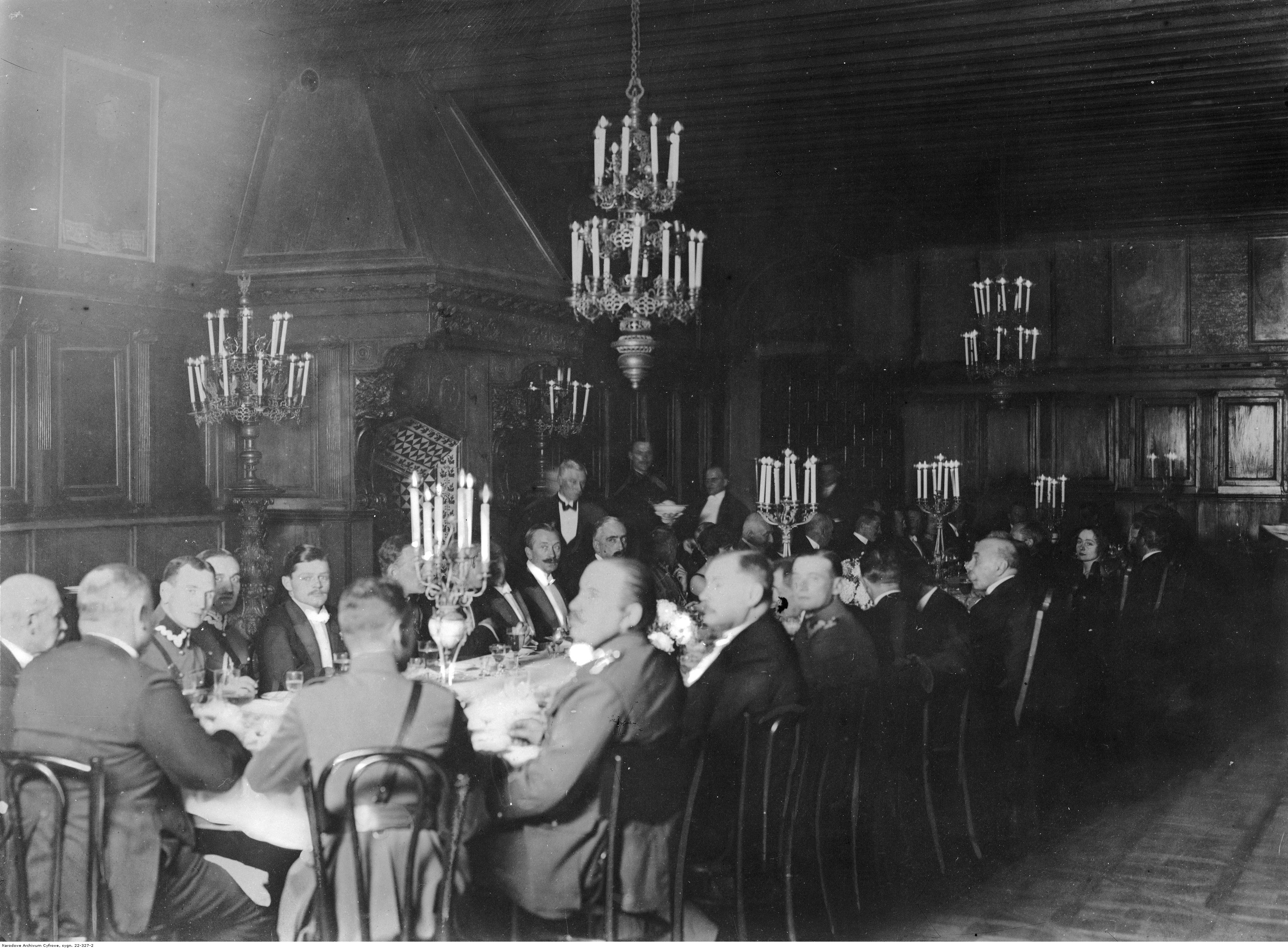 Bankiet na cześć marszałka Józefa Piłsudskiego wydany przez członków rodziny Radziwiłłów w sali kominkowej zamku. Uczestnicy bankietu przy stole. Widoczni m.in.: marszałek Józef Piłsudski (w środku z lewej, bokiem, z palcem przy ustach) i książę Janusz Radziwiłł (siwe włosy, czarny wąs).